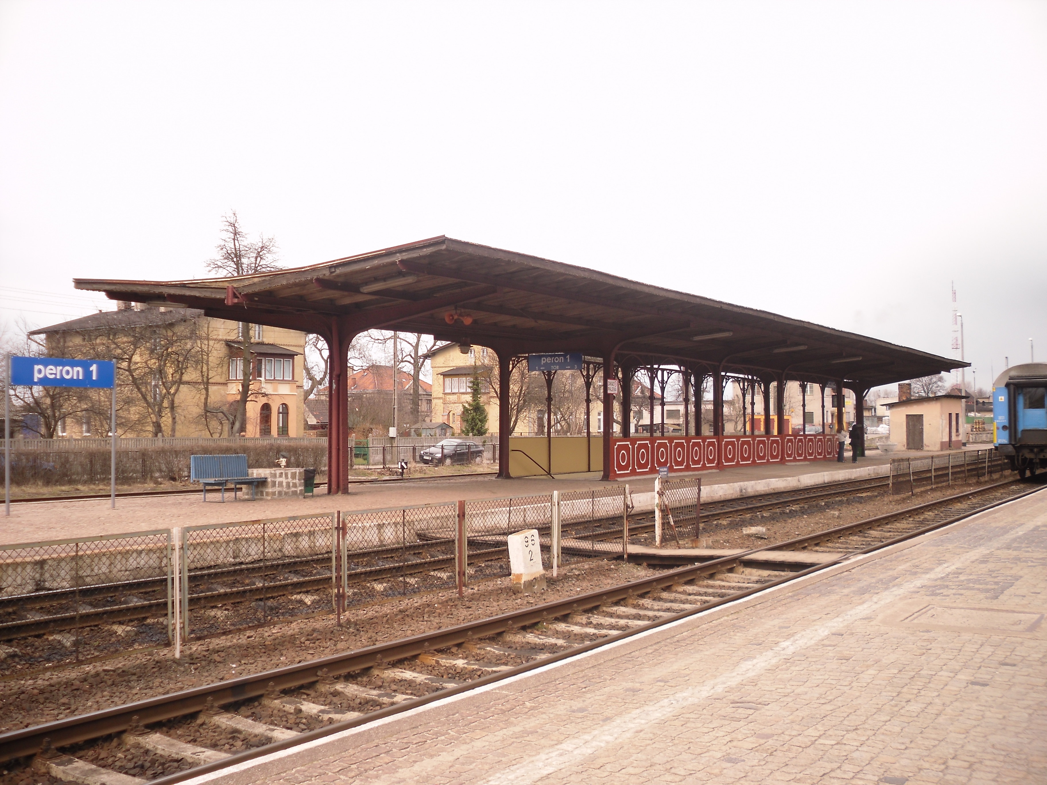 Peron stacji w Chojnicach